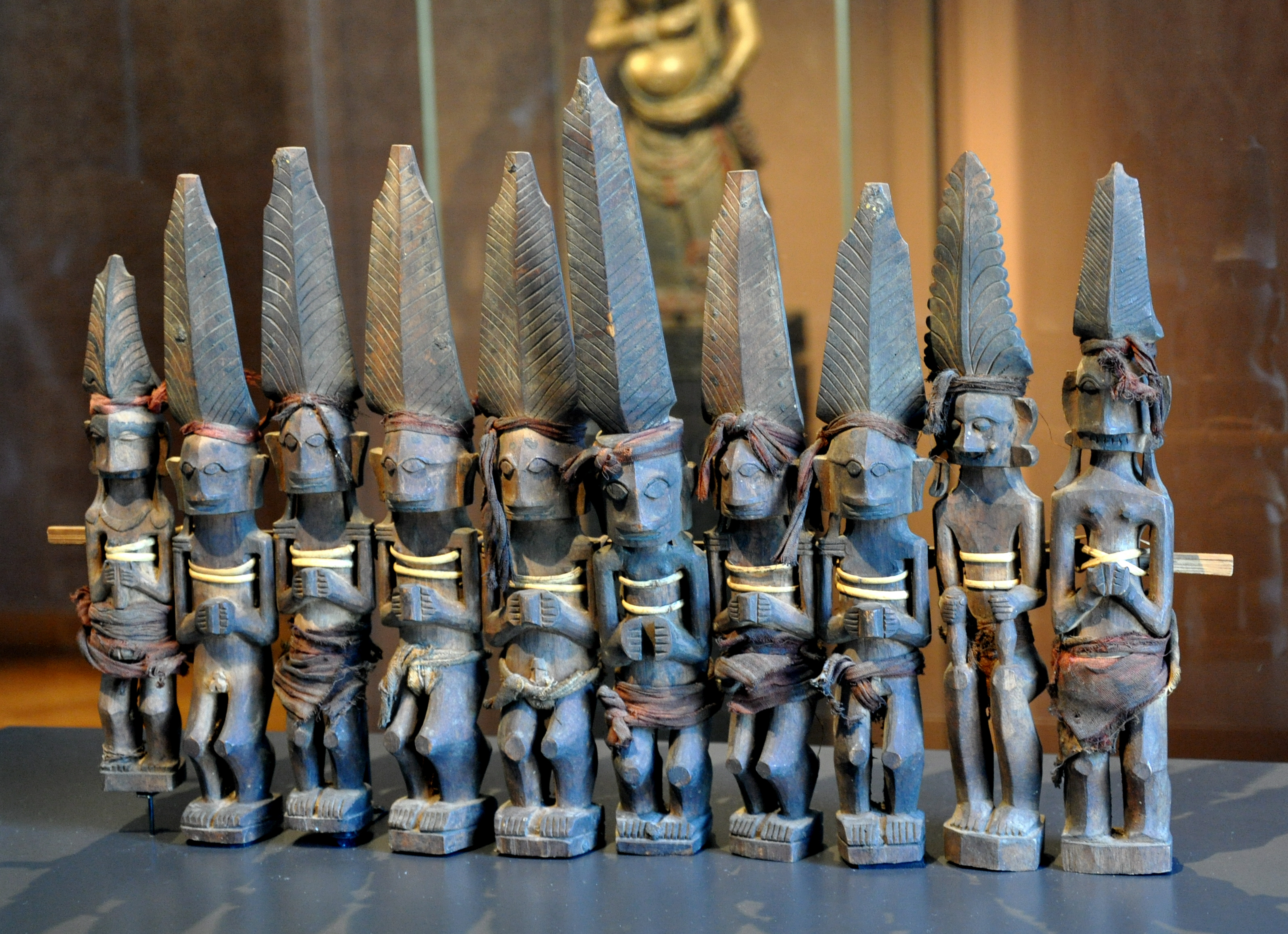 Männliche Ahnenfiguren adu zatua (wohl Aufsatz auf einen Hausschrein), Indonesien, nördliche Insel Nias, 19. Jh.; Holz, Stoff Museum Rietberg, Zürich; Geschenk Elsy Leuzinger; Inv. Nr. RIN 403